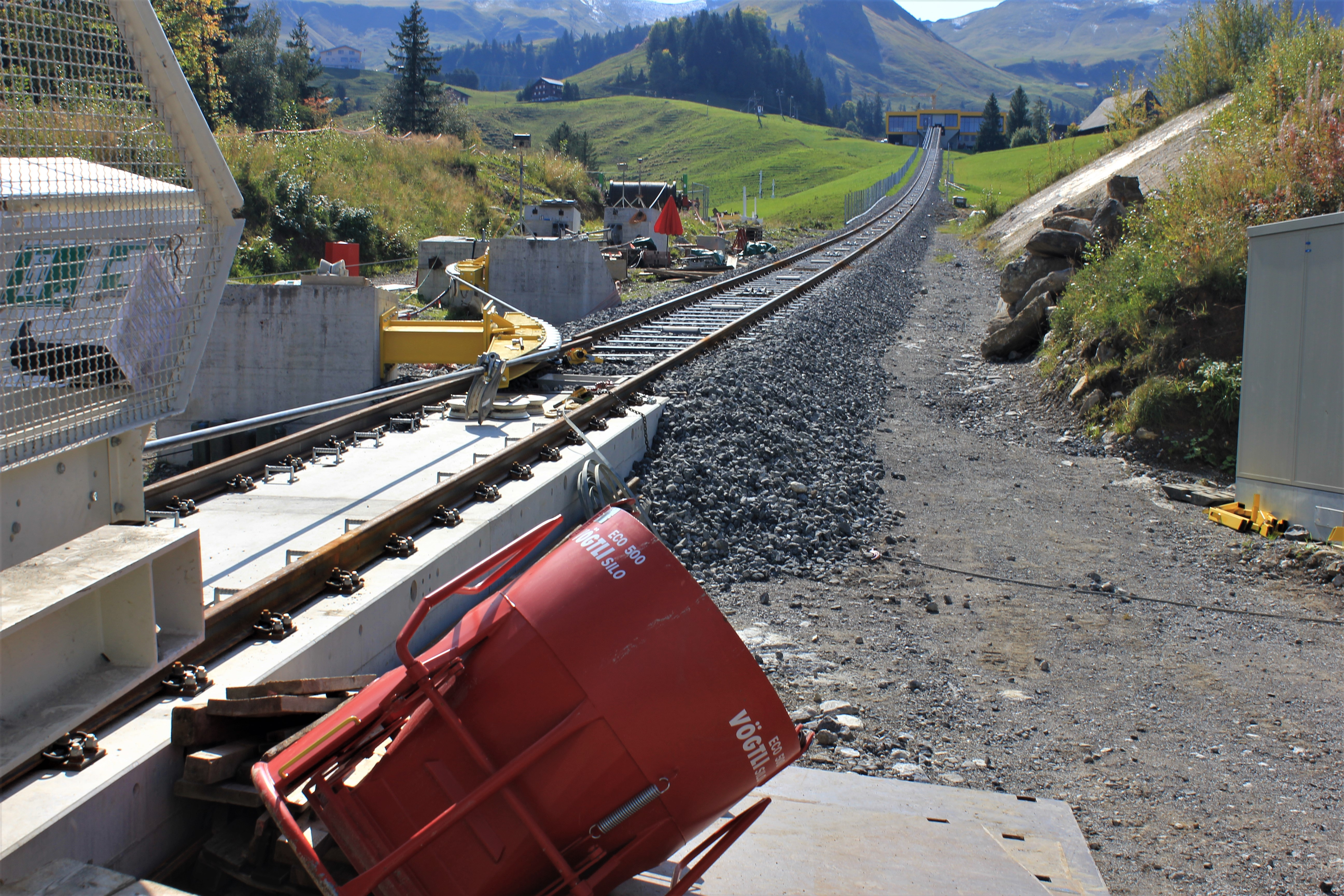 Einbau der Schwellen im obersten Abschnitt der neuen Standseilbahn